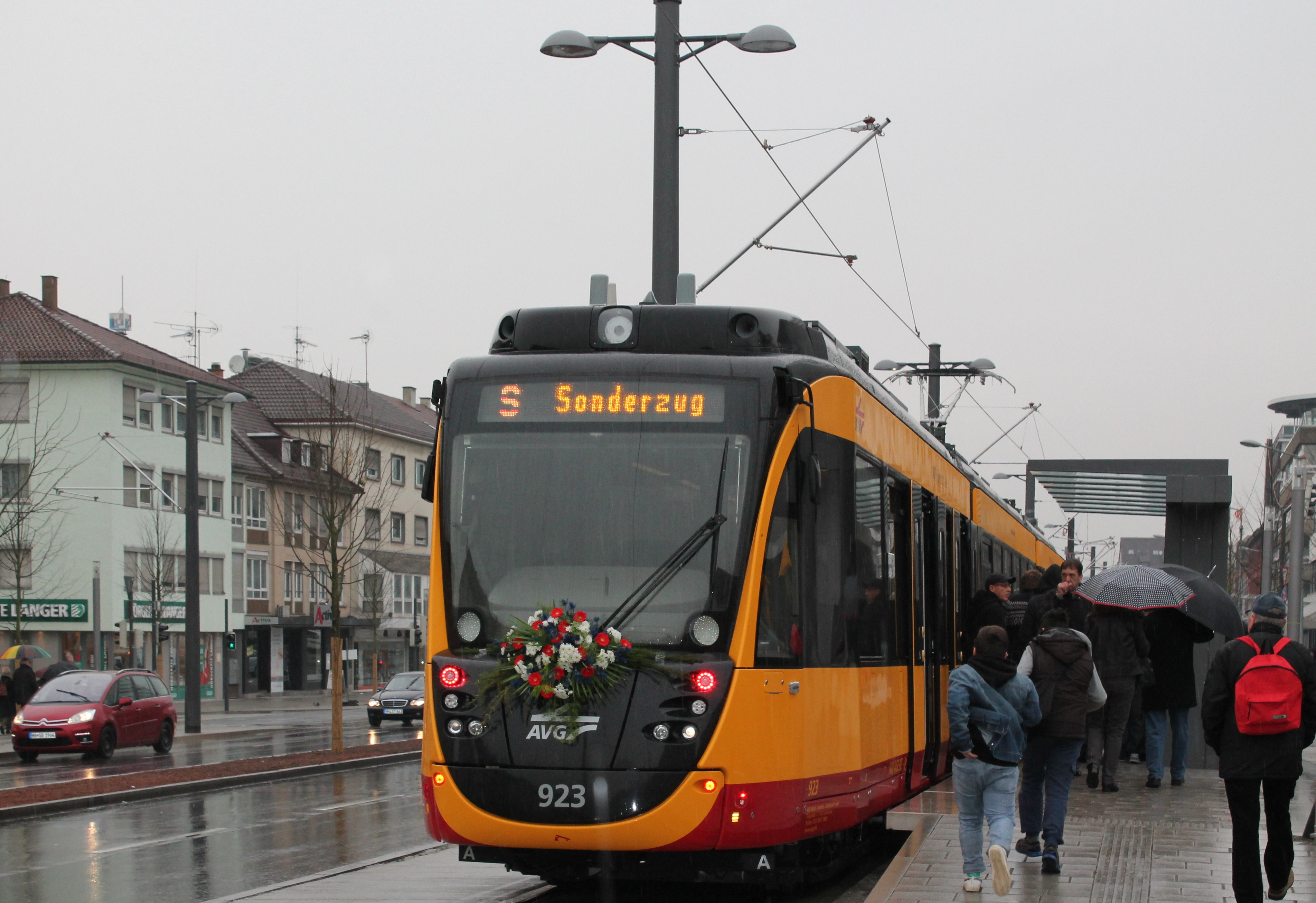 Eine Stadtbahn der Linie S42 auf dem neu eröffneten Nordast der Stadtbahn Heilbronn